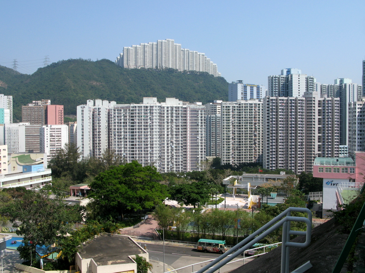 Kwai Fong Estate 葵芳邨